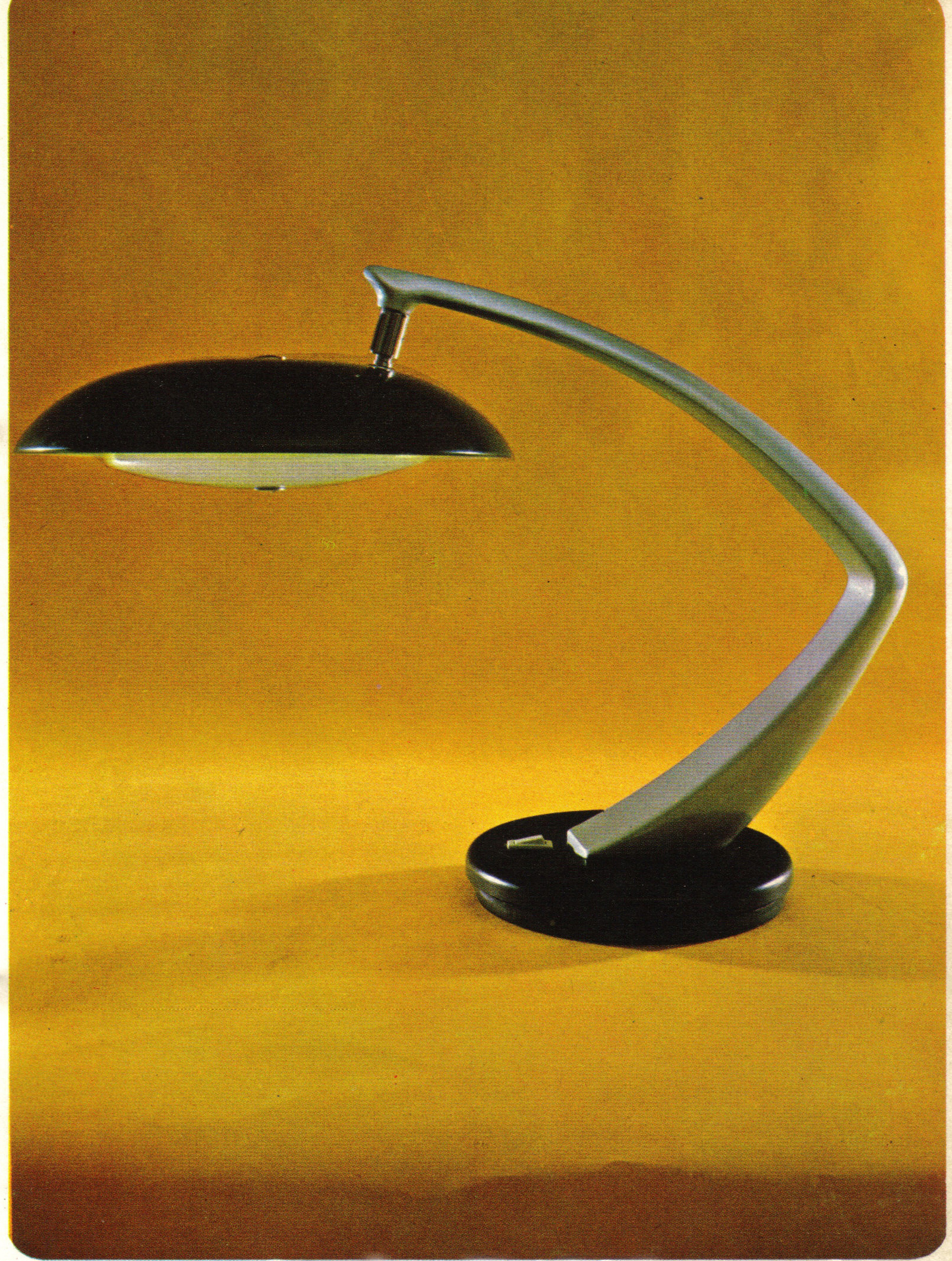 Lámpara de escritorio Bomerang 64, diseñada por Luis Pérez de la Oliva y Pedro Martín García en 1964.